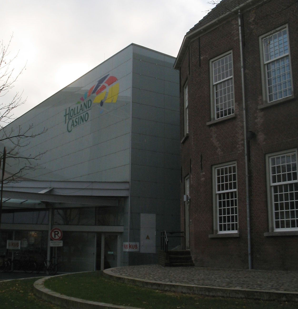 Zicht op een deel van het Holland Casino in Breda